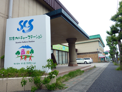 アズワンコミュニティの鈴鹿カルチャーステーションです。 １．コミュニティステーション「街の誰でもが いつでも 寄ってきて 憩える 街の縁側づくり」 ２．カルチャーステーション「大人も子どもも学ぶ 街の学び舎づくり」 ３．エコステーション「循環共生型コミュニティづくりの起点に」 という三つのステーションを事業軸として展開し、新しい人と人との出会いや繋がりが生まれています。 子どもも大人も育つ社会づくりの起点として、コミュニティならではの新しい文化の創造と発信、そして街の学び舎づくりが日々進行しています。 また、この中には、アズワンコミュニティステーションもあります。 鈴鹿の街中でそれぞれに暮らしを営みながら多種多様な活動を繰り広げているアズワンコミュニティの中で、ここは人と人、各種機関や分野が交差し、出会い、寄り合い、また次に向けてスタートしていく「コミュニティの駅」のような場所です。初めて訪れる人達にとっては「コミュニティの玄関」とも言えるでしょう。